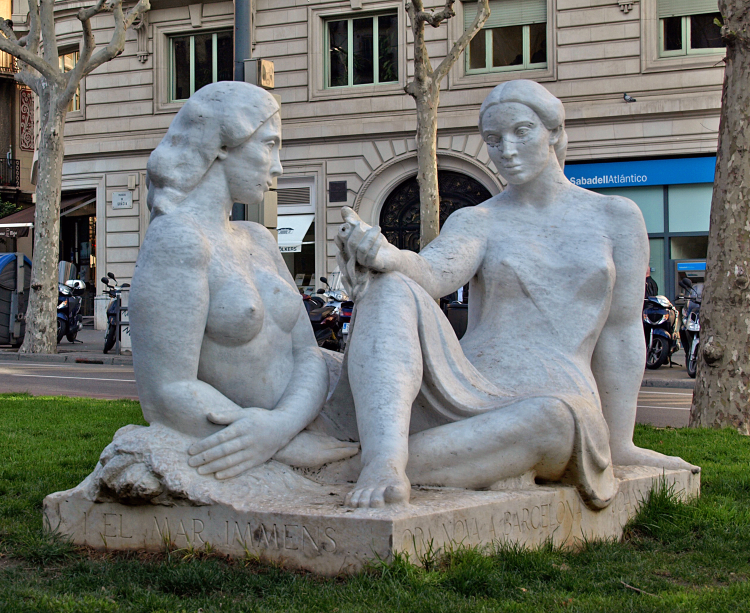 Empordà (Ernest Maragall, 1961), located at the Jardinets de Gràcia, Passeig de Gràcia, Barcelona